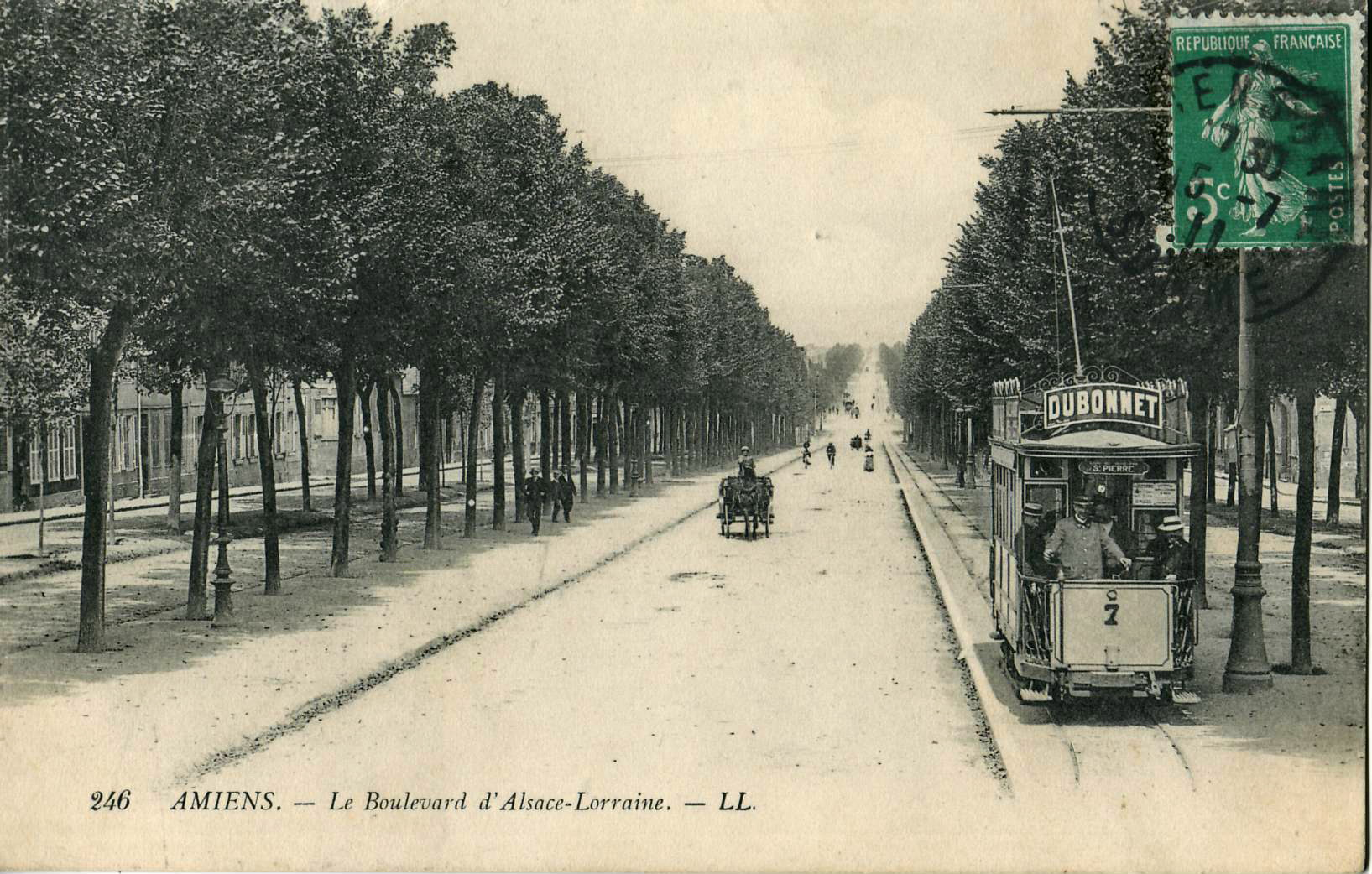 Carte postale ancienne éditée par LL, n°246 :AMIENS - Le Boulevard d'Alsace-Lorraine.Vue en gros plan du tramway d'Amiens